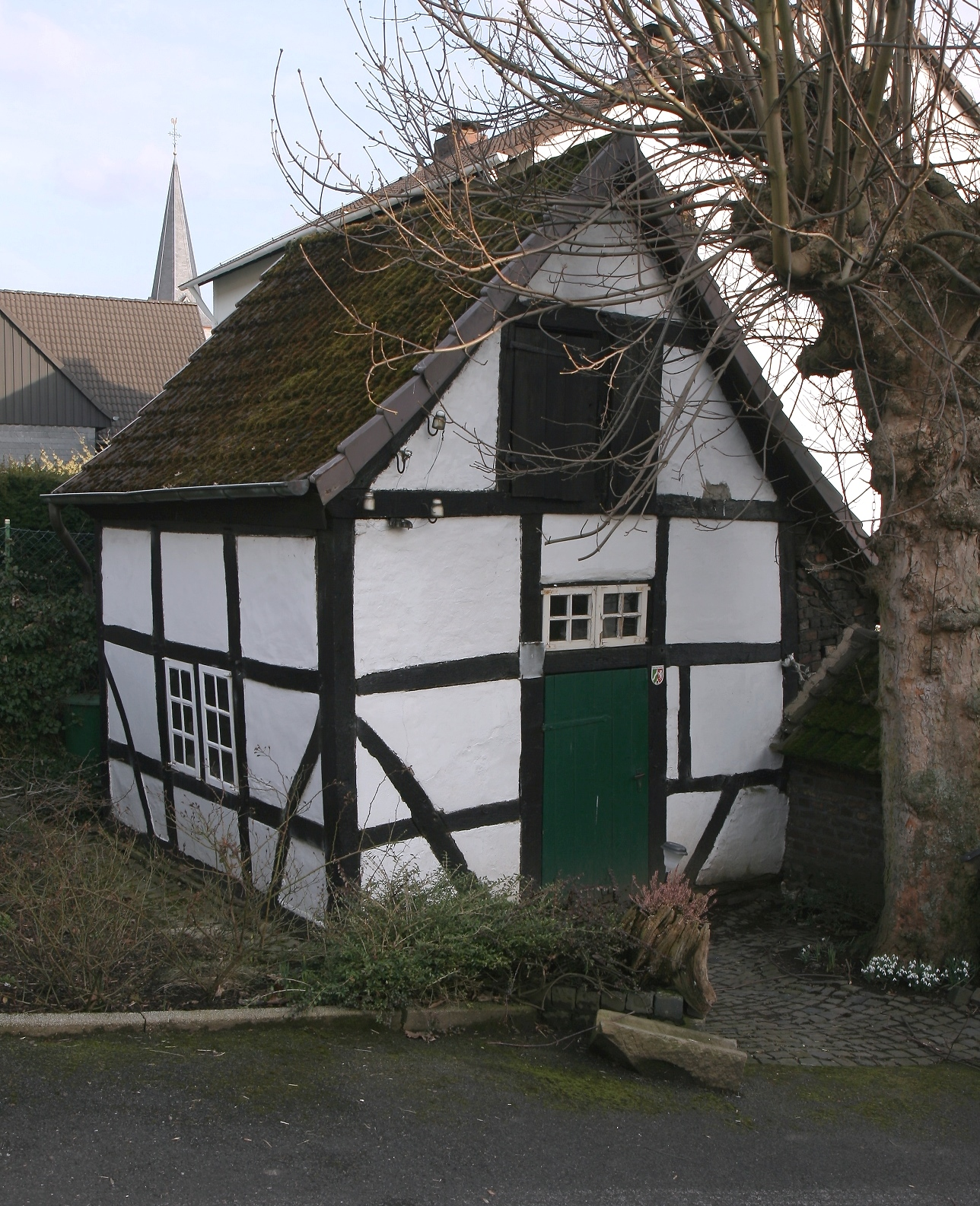 „Kettenschmiede Teves“ in Iserlohn-Oestrich, Berliner Allee 112. Vermutlich in der 2. Hälfte des 18. Jahrhunderts erbaut, 1815 erstmals erwähnt, 1981 restauriert. Denkmal seit 28. März 1983.